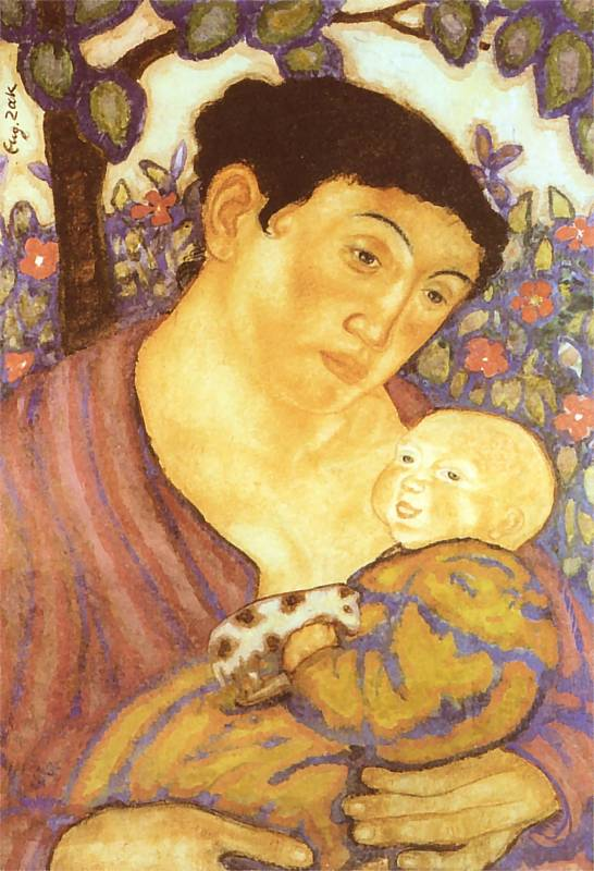 reprodukcja obrazu Eugeniusza Zaka